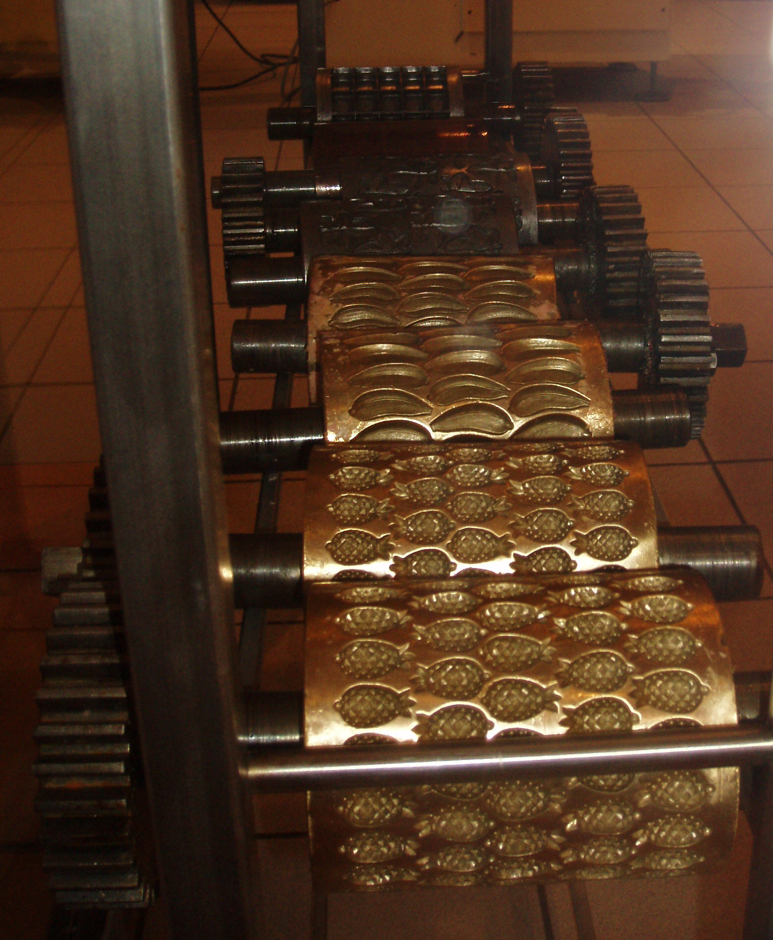 Formen zur Bonbonherstellung